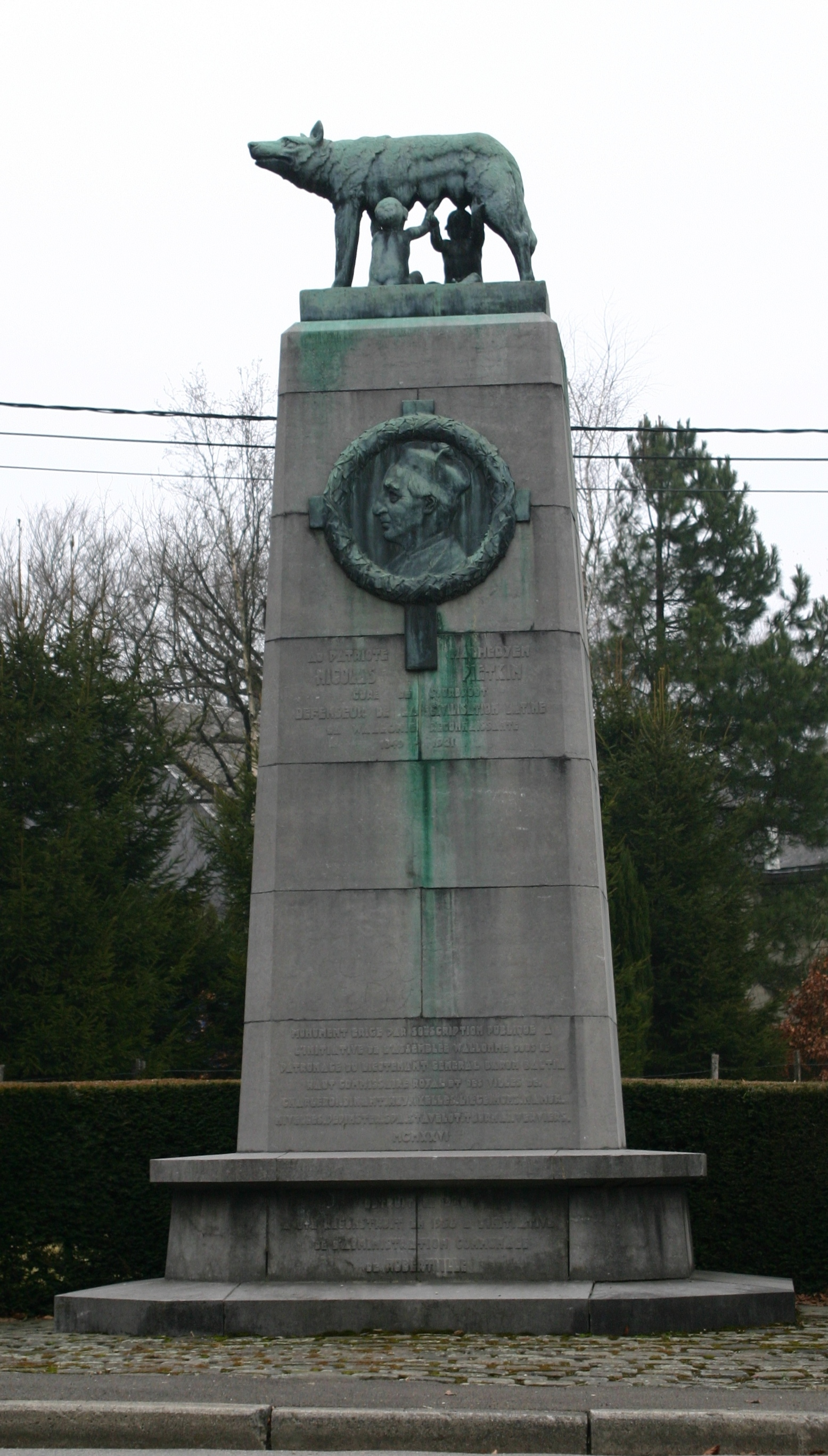 D'Monument fir den Abbé Pietkin zu Sourbrodt.